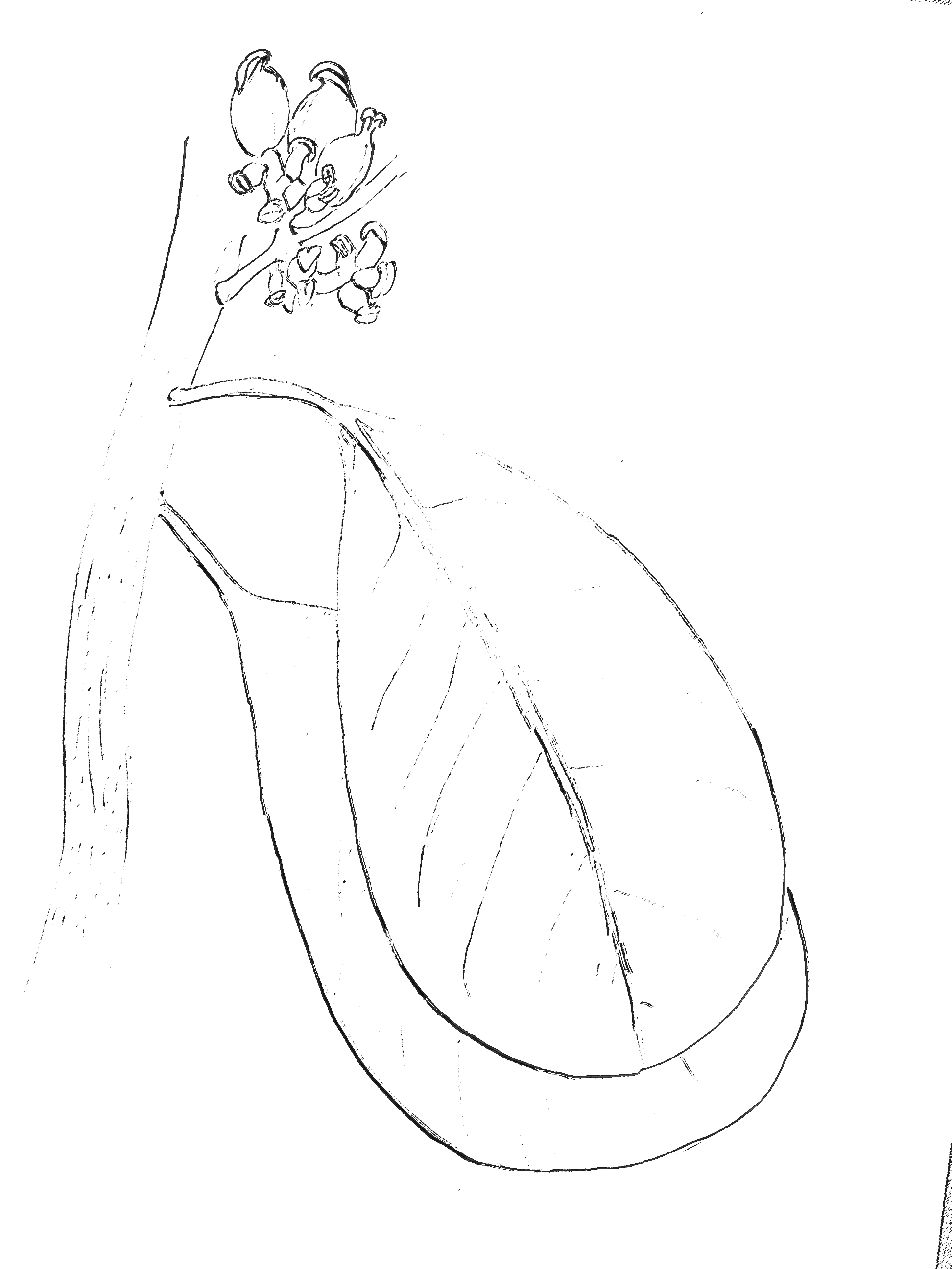 Didymeles handmade drawing